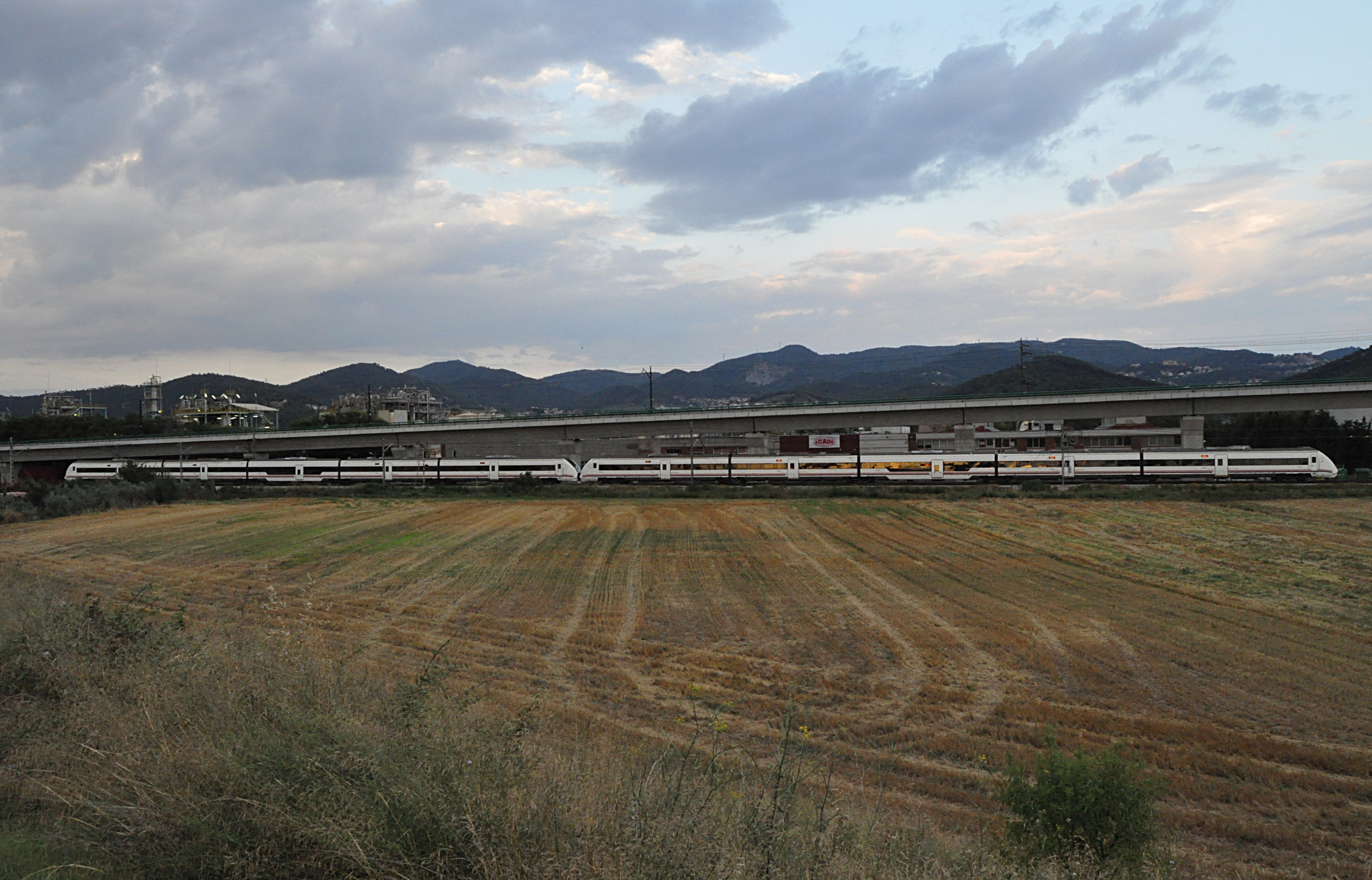 Un automotor eléctrico de la serie 449 de Renfe Operadora, a punto de pasar por la estación de Mollet - Sant Fost (Mollet del Vallès, Cataluña).